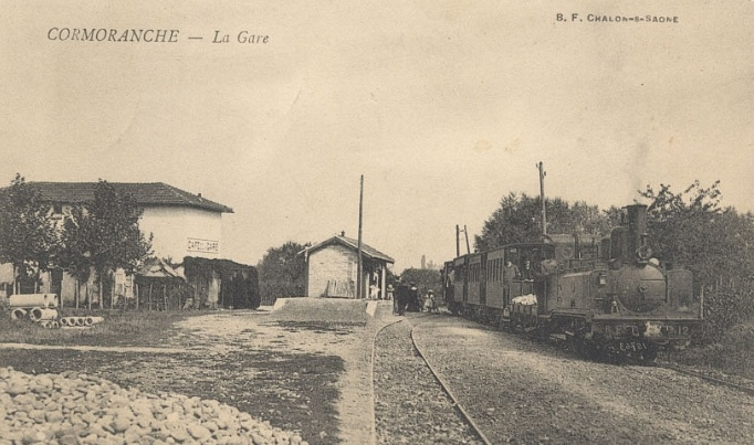 Gare de Cormoranche-sur-Saône pour les tramways de l'Ain.